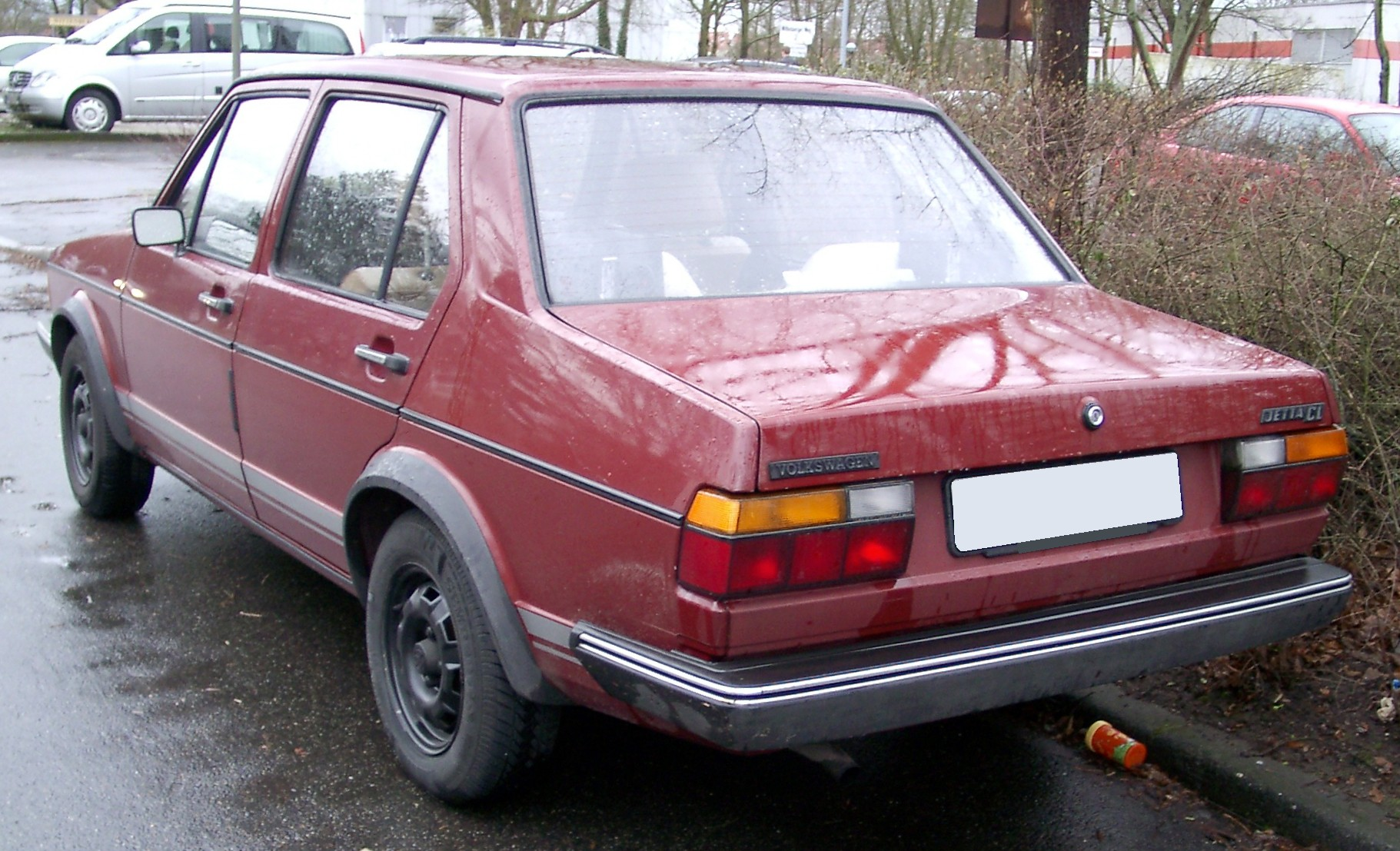 VW Jetta